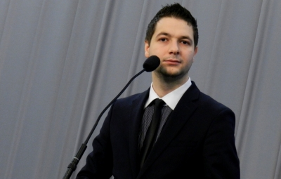 Poseł Patryk Jaki podczas konferencji prasowej, Sejm RP